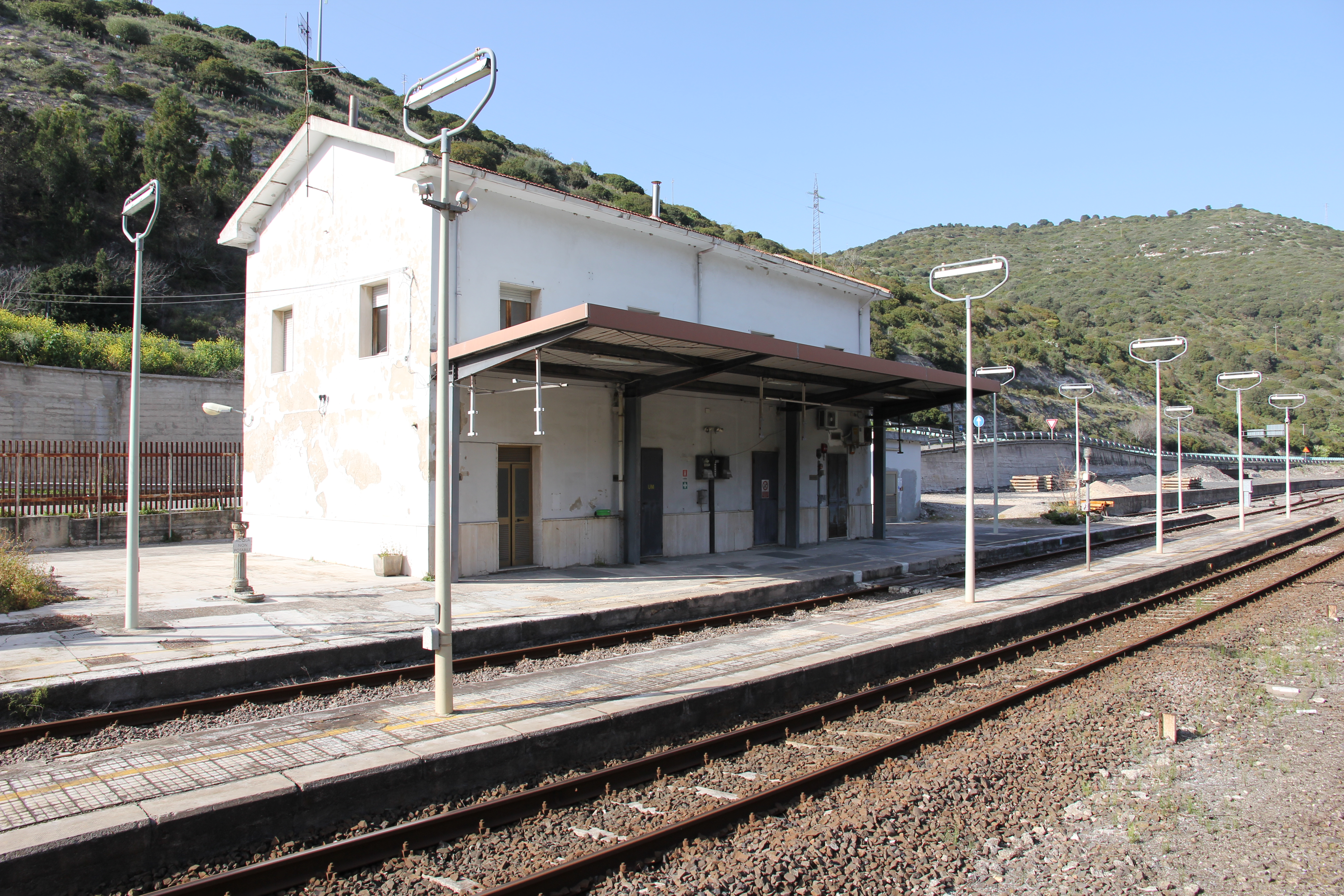 Muros - Stazione ferroviaria di Scala di Giocca